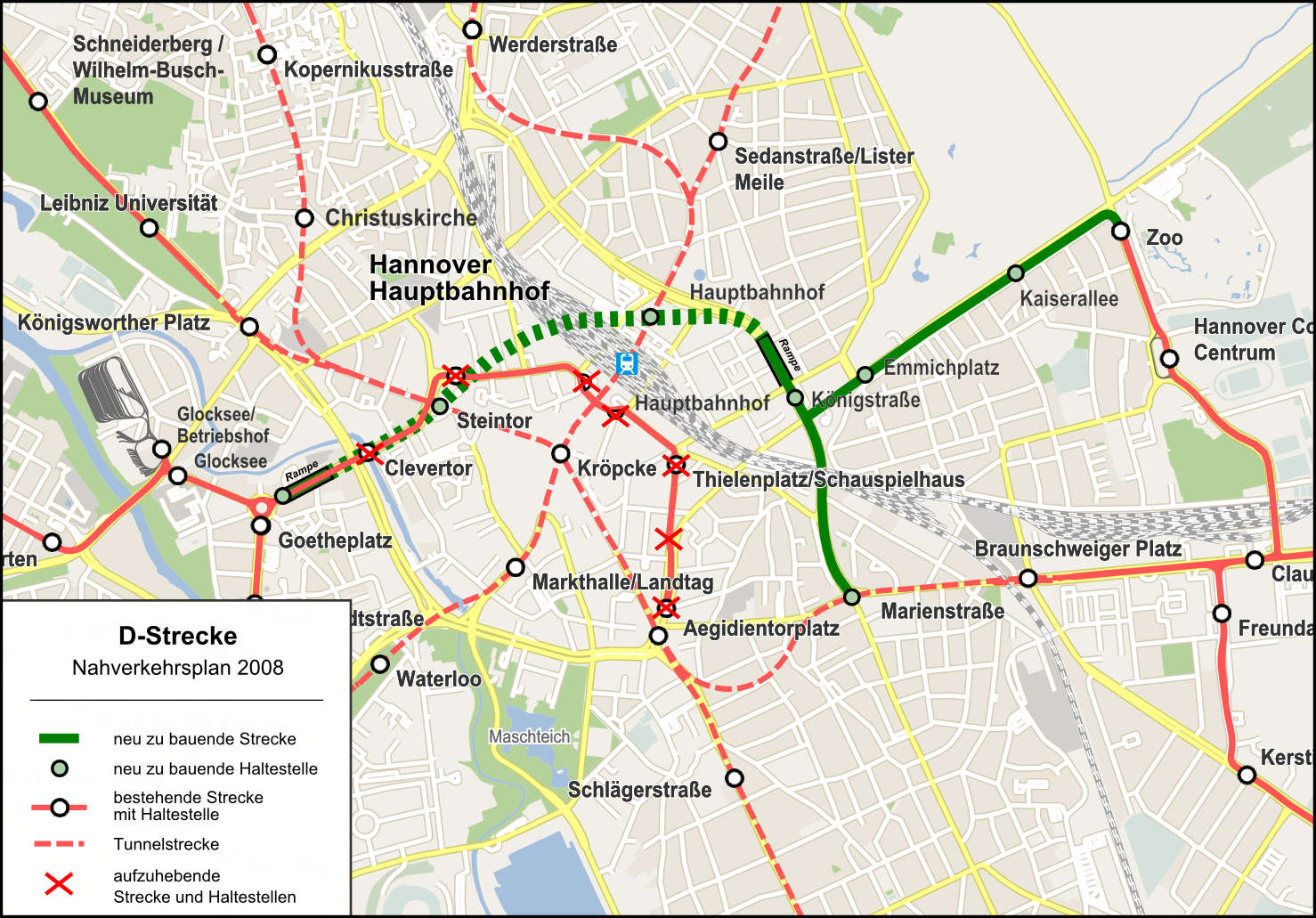 Ausbau D-Strecke Innenstadt: Planung aus dem Nahverkehrsplan 2008 mit unterirdischer Station Steintor